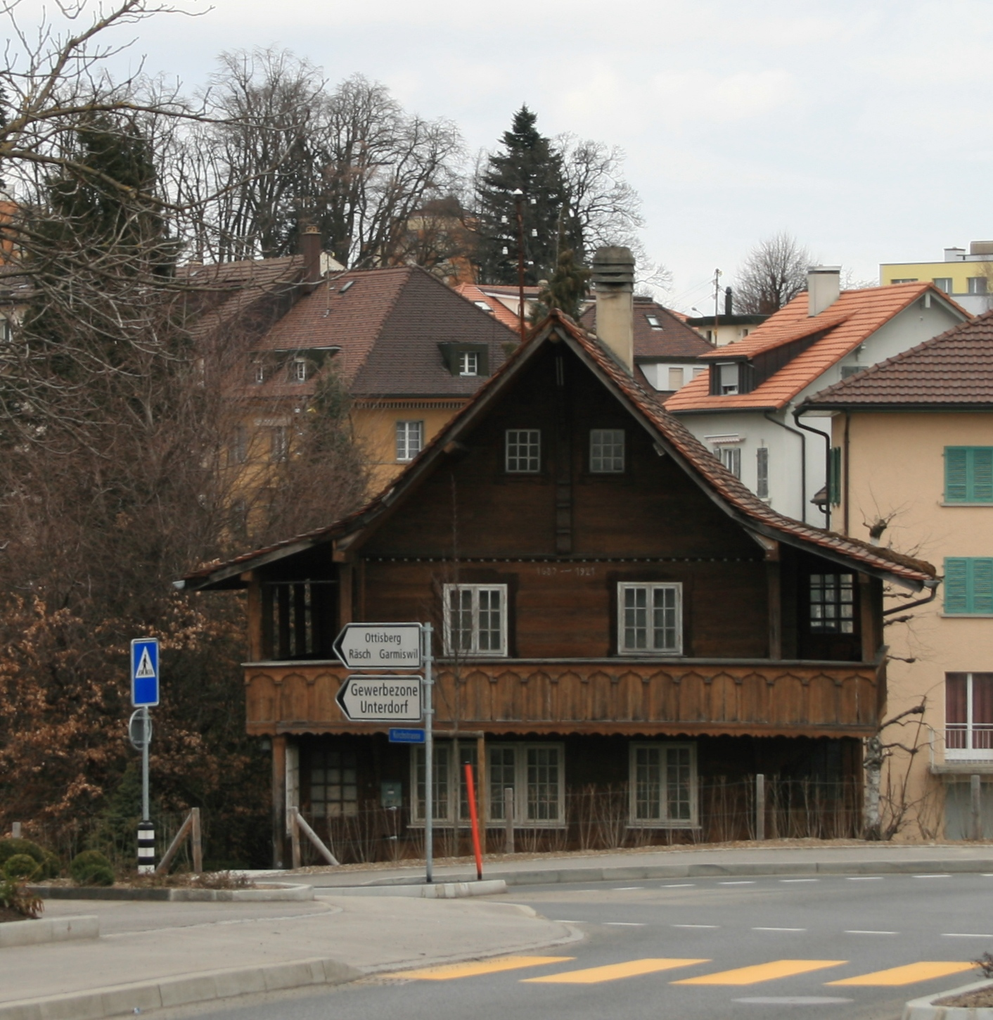 Düdingen, Schweiz